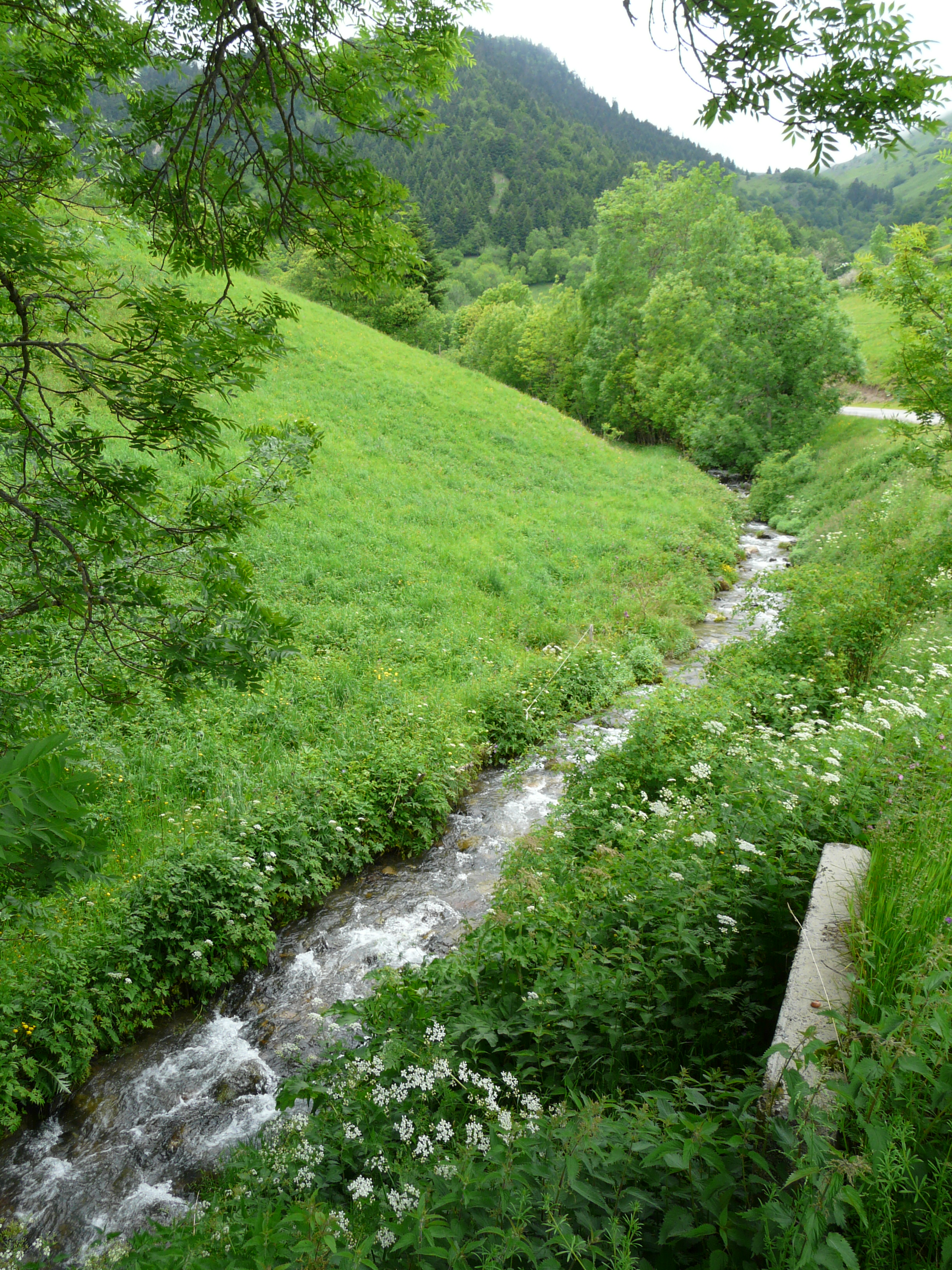 La Neste d'Oueil le long de la route départementale 51, à l'est-sud-est du village de Bourg-d'Oueil, Haute-Garonne, France. Vue prise en direction de l'amont.